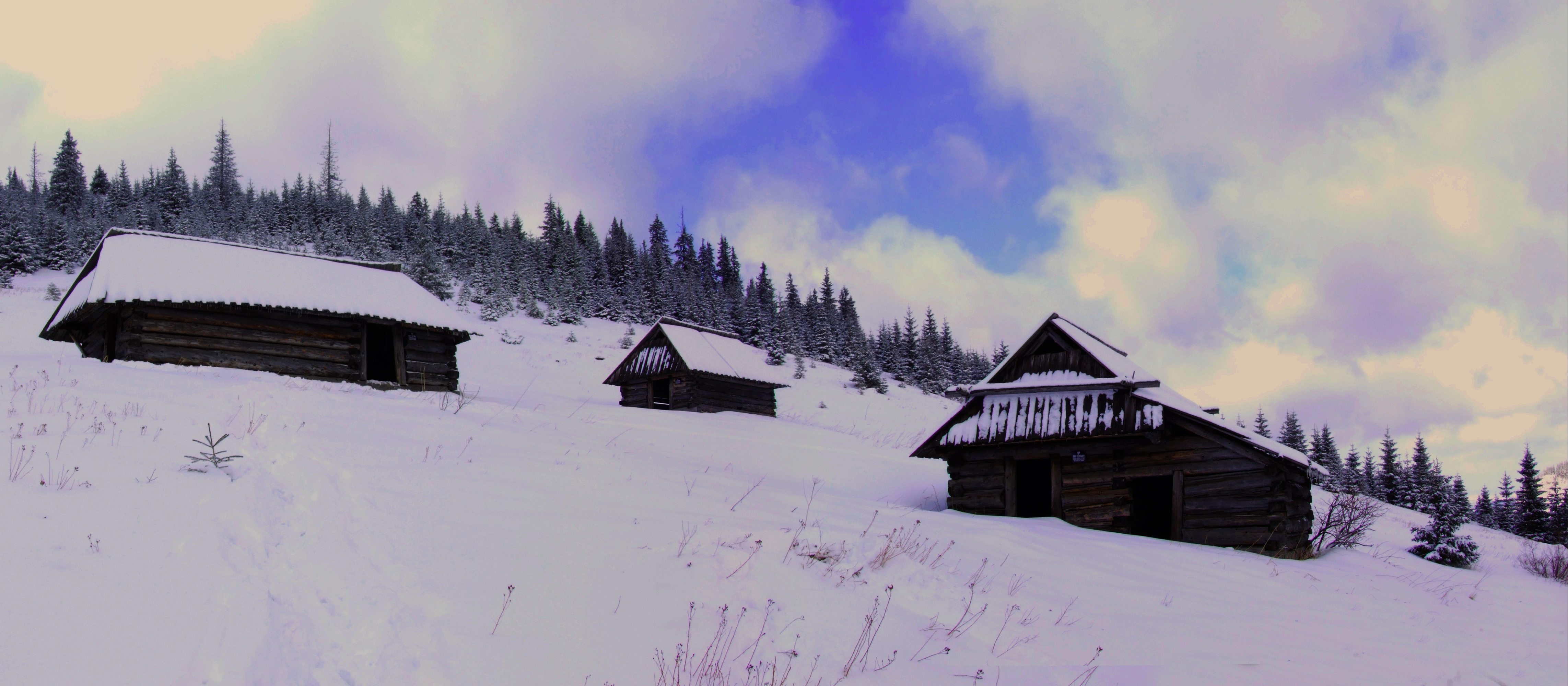 Polana na Stołach w Tatrach Zachodnich